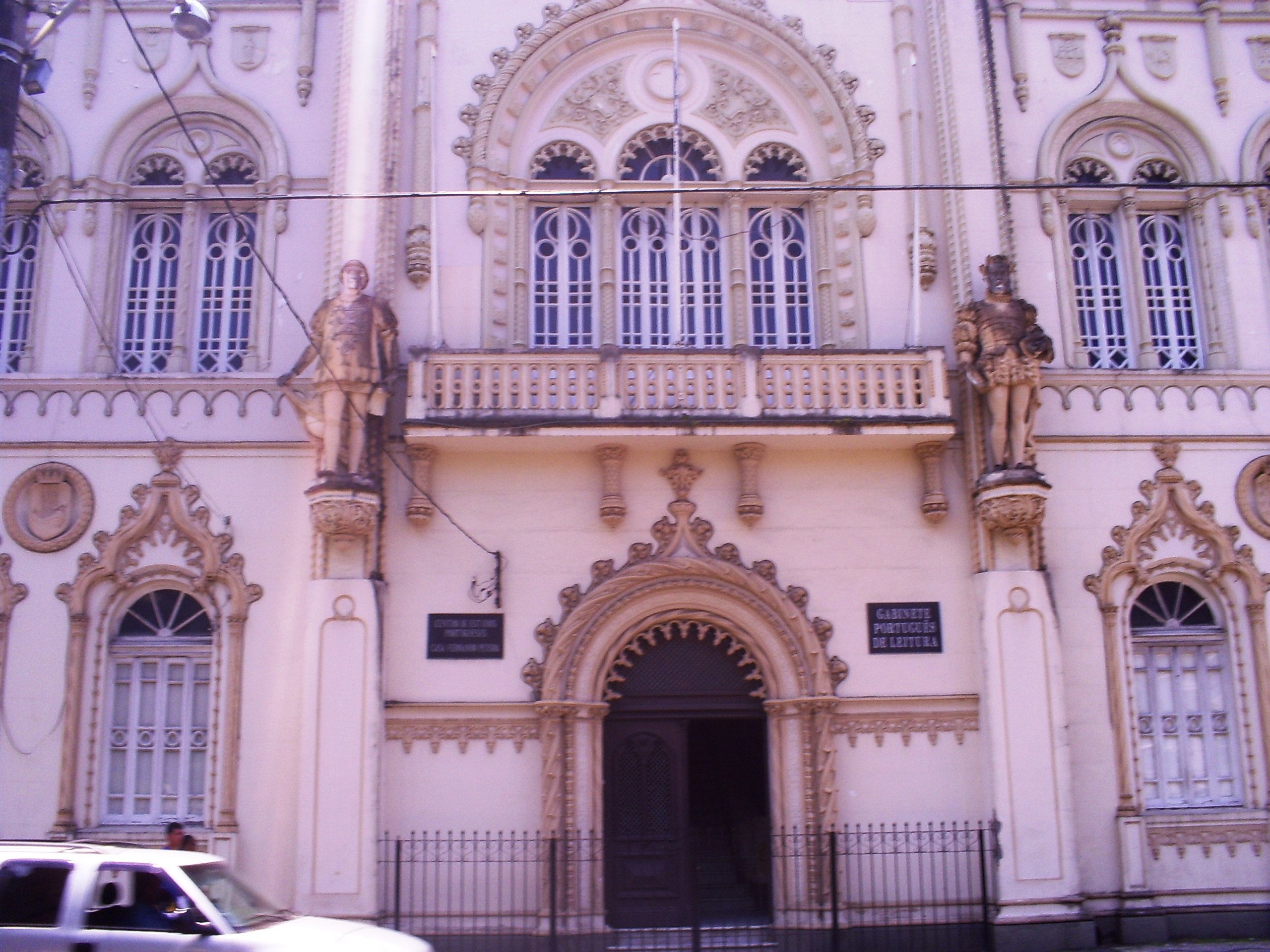 Foto da Biblioteca Gabinete Português de Leitura, Salvador, Bahia, Brasil.